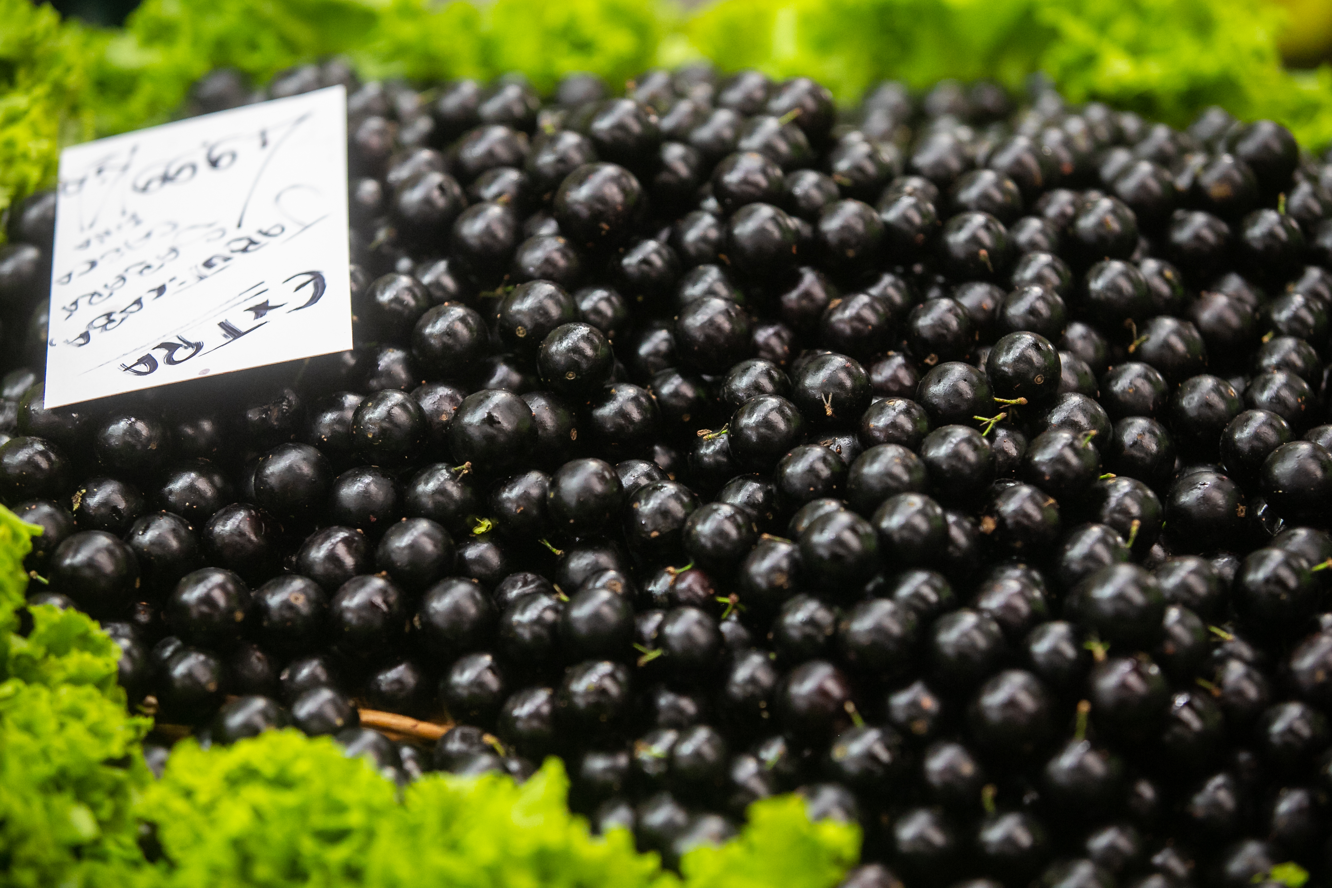 Produtos do Agro Paulista